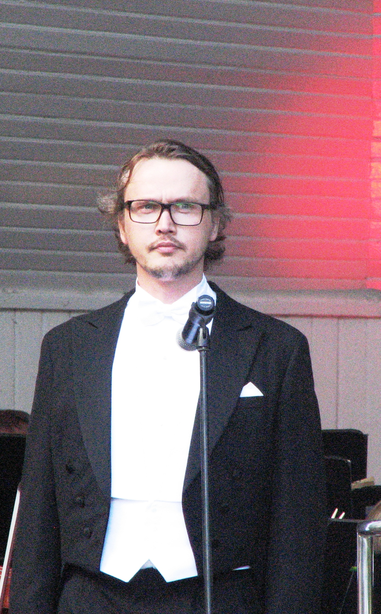 Andres Köster esinemas Saaremaa Ooperipäevade avakontserdil "Kuressaare 450"